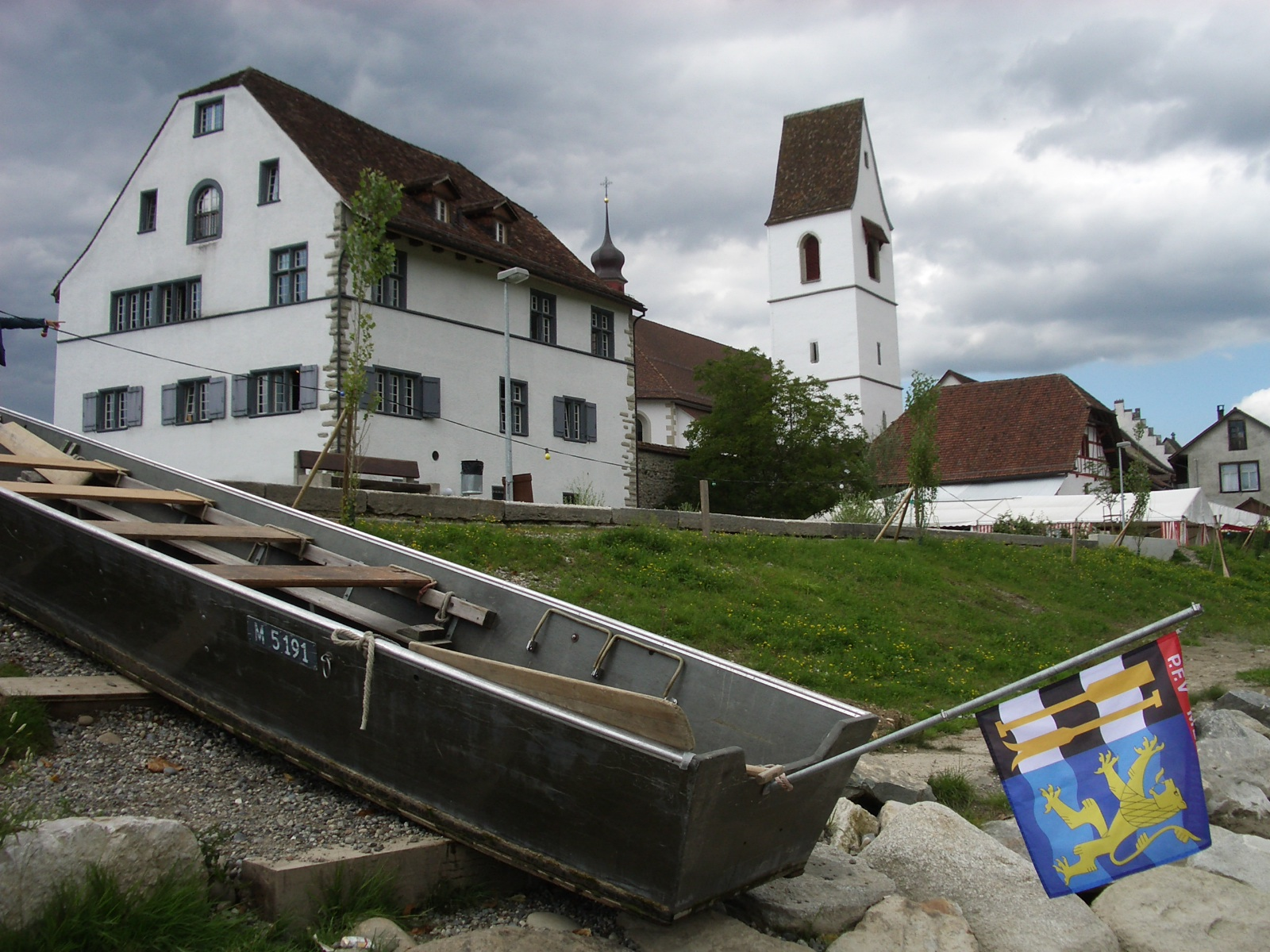 Mellingen AG, Stadtkirche (hinten) und Iberghof (vorne) self-made, August 2006